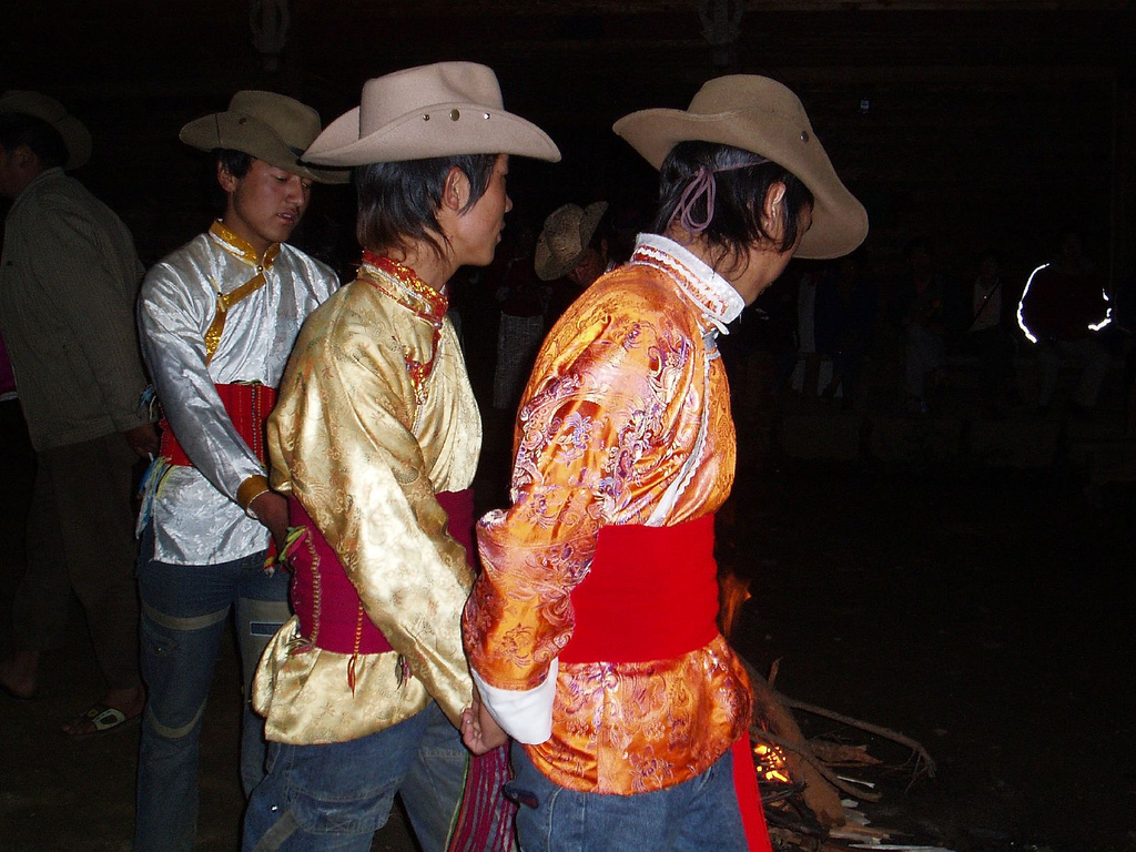 Mosuo boys